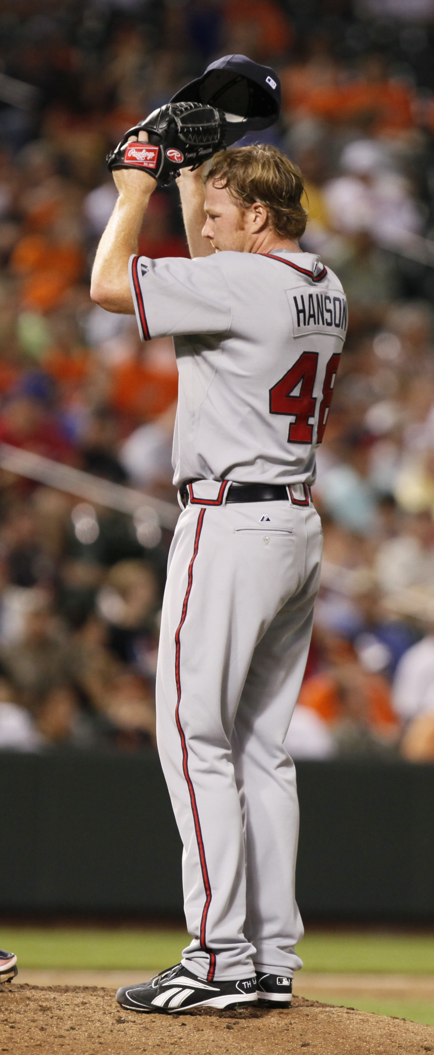 Tommy Hanson